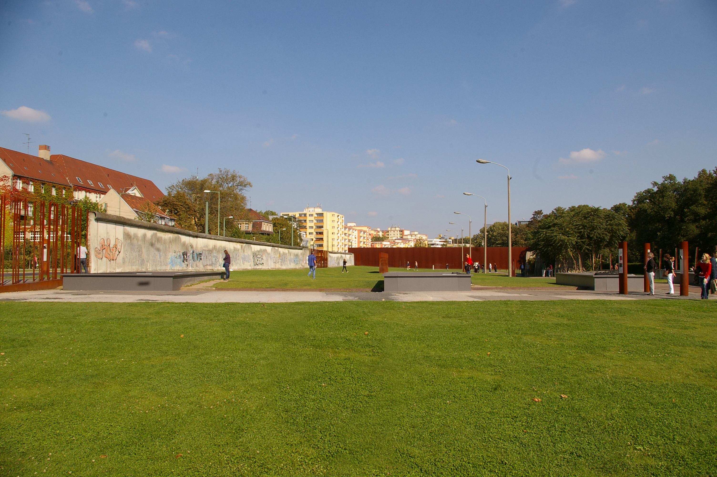 Gedenkstätte Berliner Mauer, von der Gartenstraße aus Richtung Osten gesehen